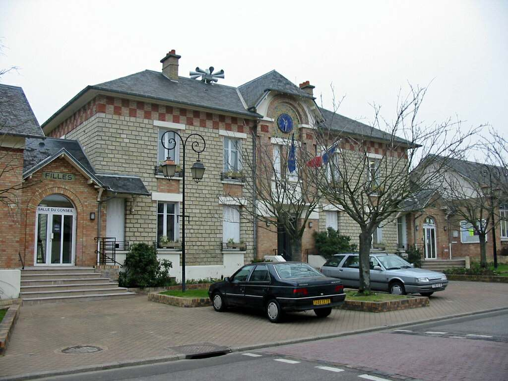 Mairie de Buchelay (Yvelines) Photo JH Mora, février 2006 Licensing catégorie:Image de Buchelay Buchelay